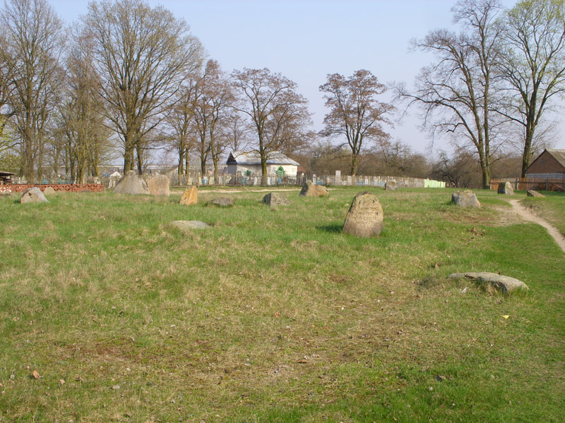 Беларуская (тарашкевіца): Габрэйскія могілкі ў Антопалі